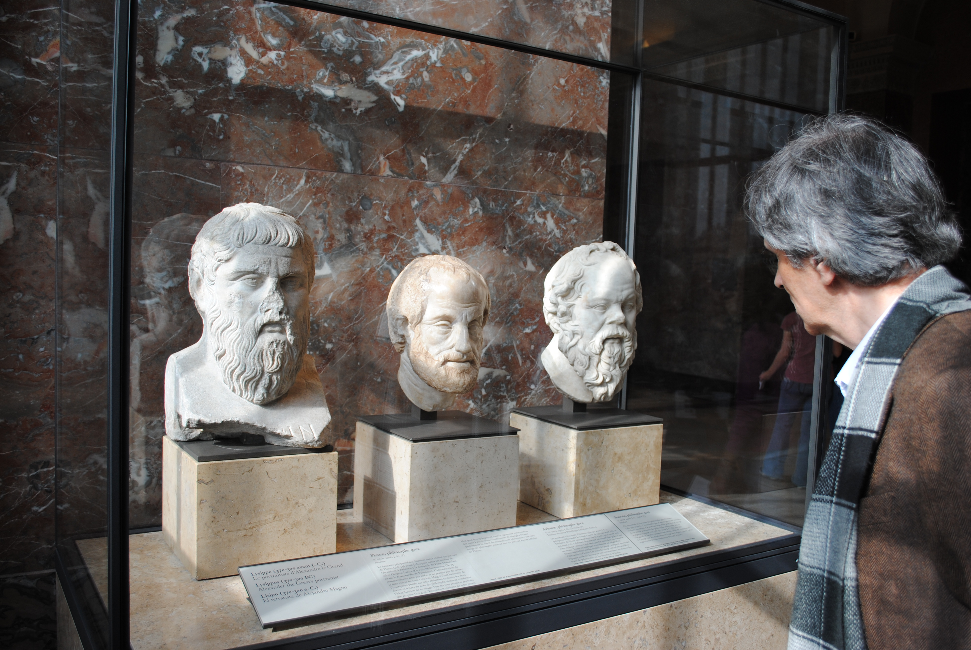 Prof. Bracinha Vieira contempla algumas das suas fontes de inspiração. Museu do Louvre, Paris, 2010.